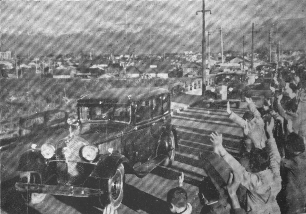 富山大橋上の奉送